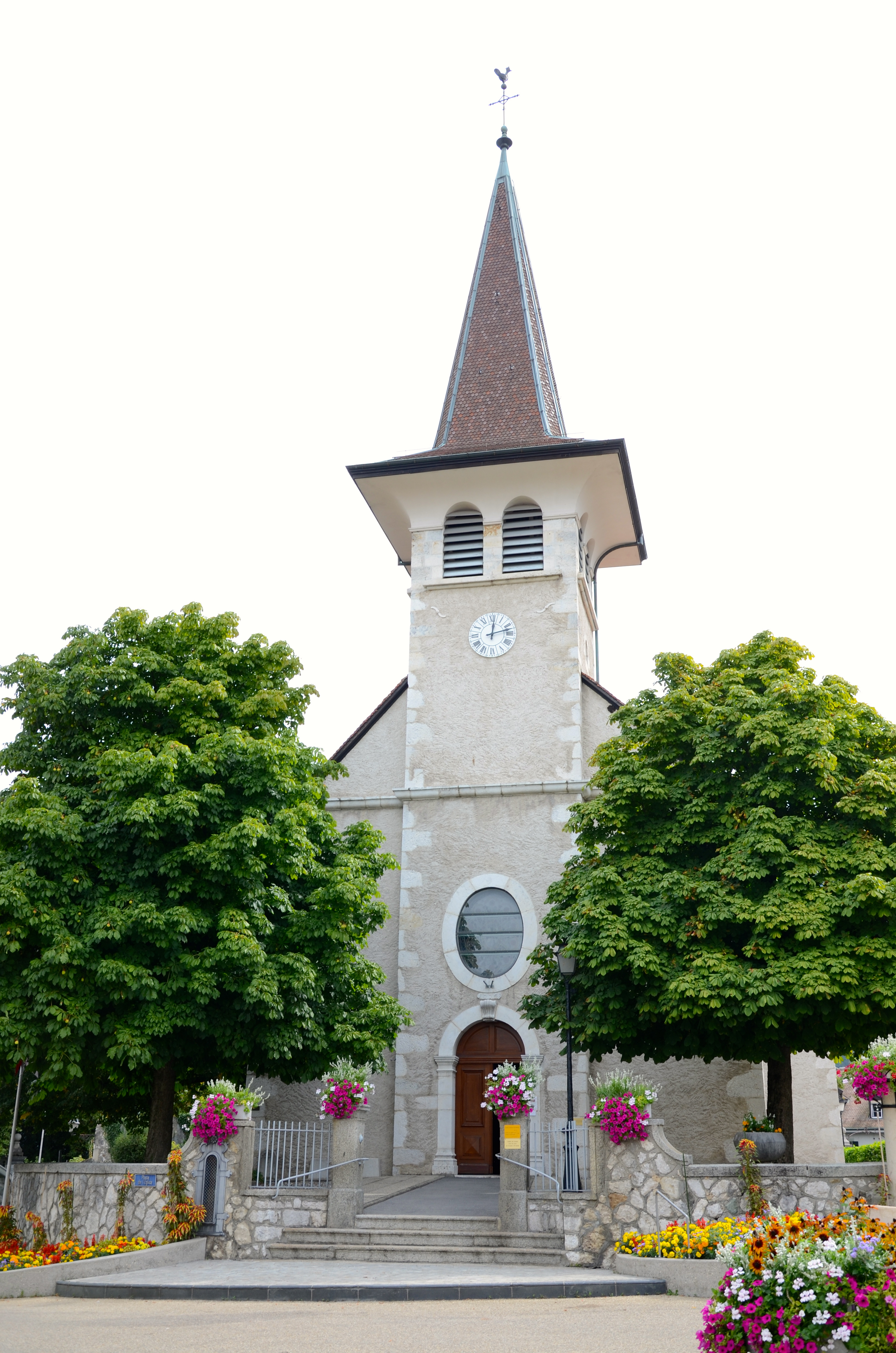 Eglise Saint-Maurice, Place de l’Église 20, Veyrier